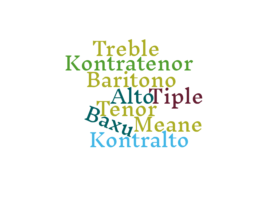 Ahots mota batzuen izenak euskaraz eta ingelesez